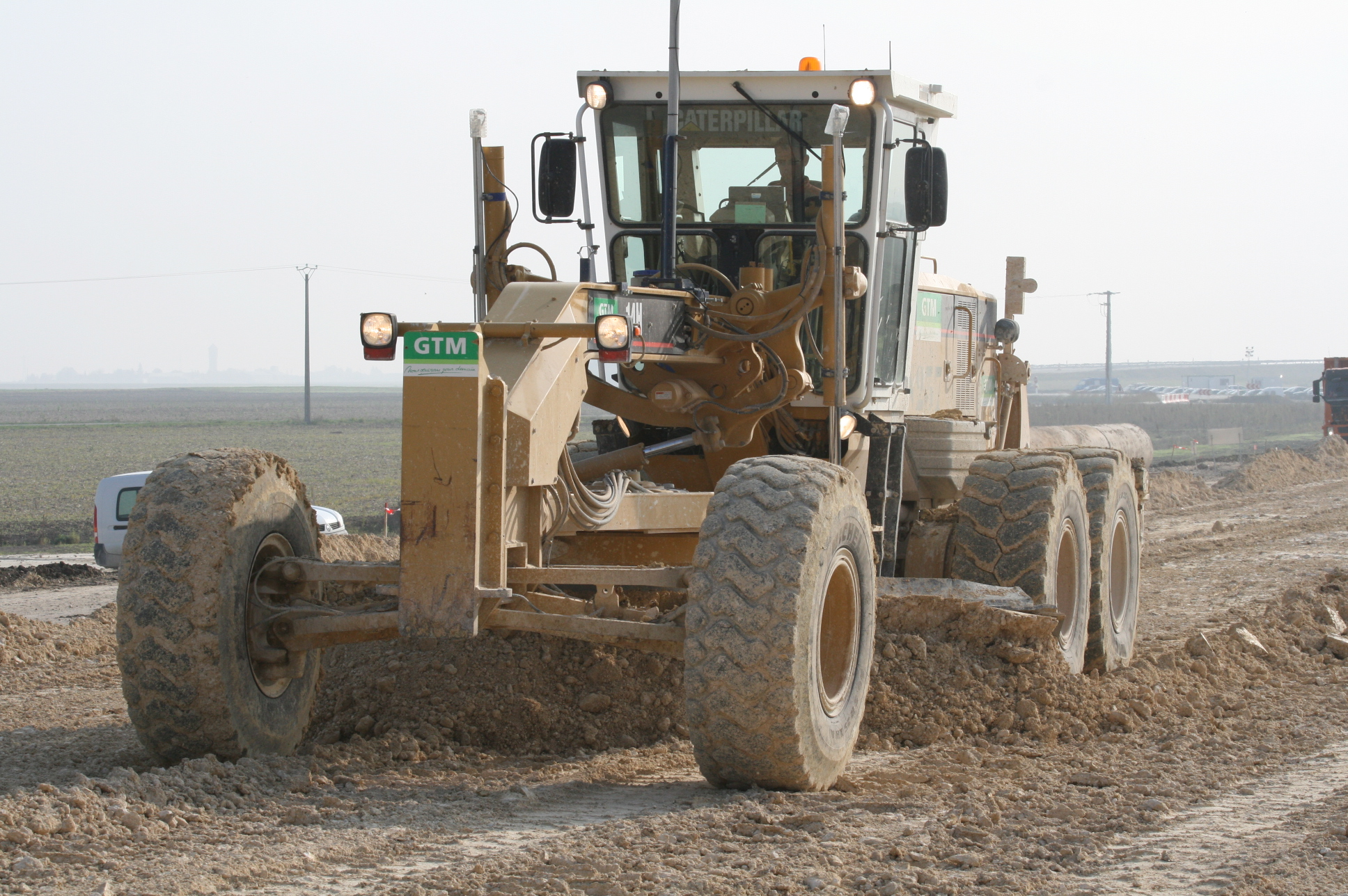 Autoroute A19 – Niveleuse utilisée pour les terrassements